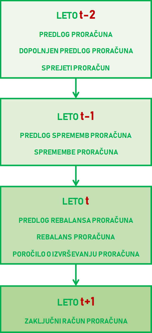 Proračunski dokumenti in sosledje nastanka